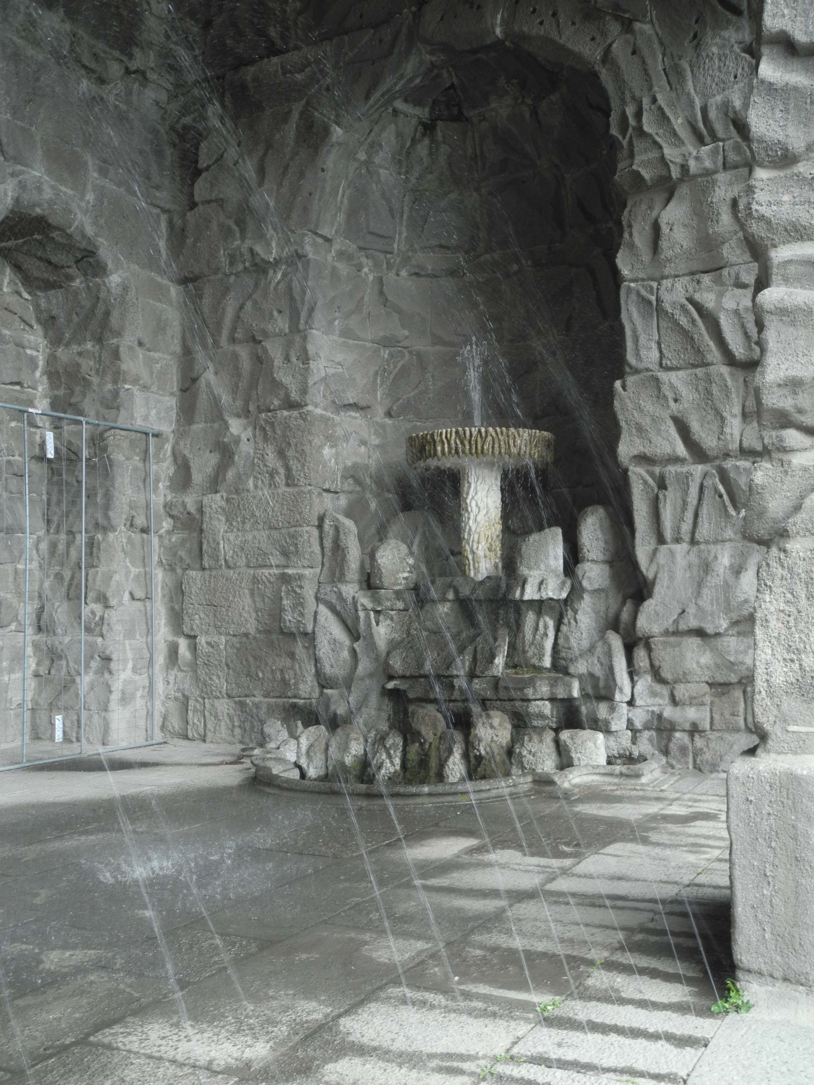 Die Vexierwassergrotte des Herkules im Bergpark Wilhelmshöhe in Kassel, Hessen, Deutschland. Nördlicher Brunnentisch mit spritzenden Vexierwasser aus Bodendüsen.